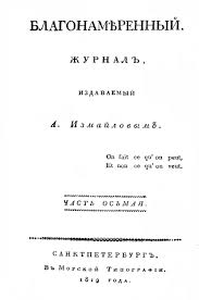 Благонамеренный — российский журнал, издававшийся Александром Измайловым в 1818—1826 годах